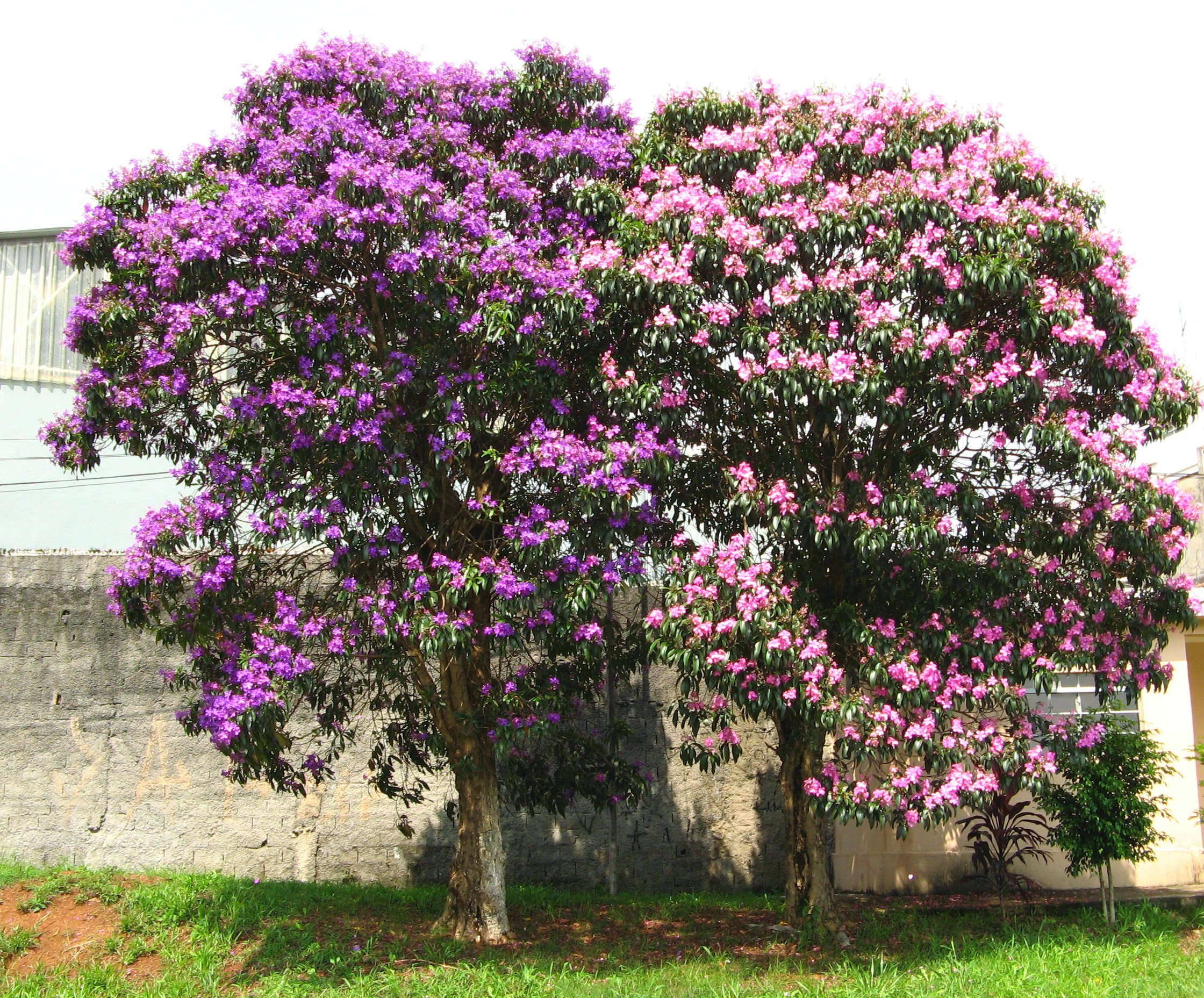 quaresmeiras